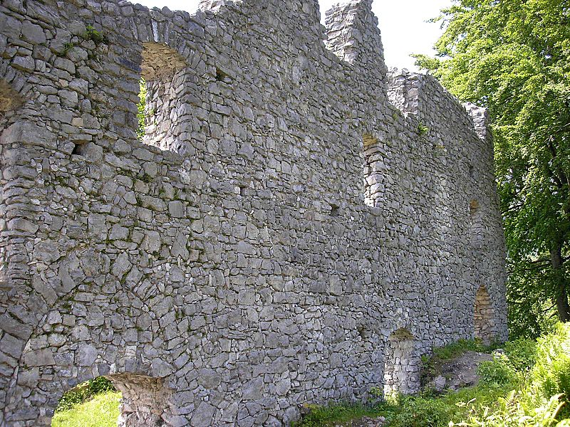 Burg Werdenfels bei Garmisch-Partenkirchen (Oberbayern). Die Hofseite des Palas.